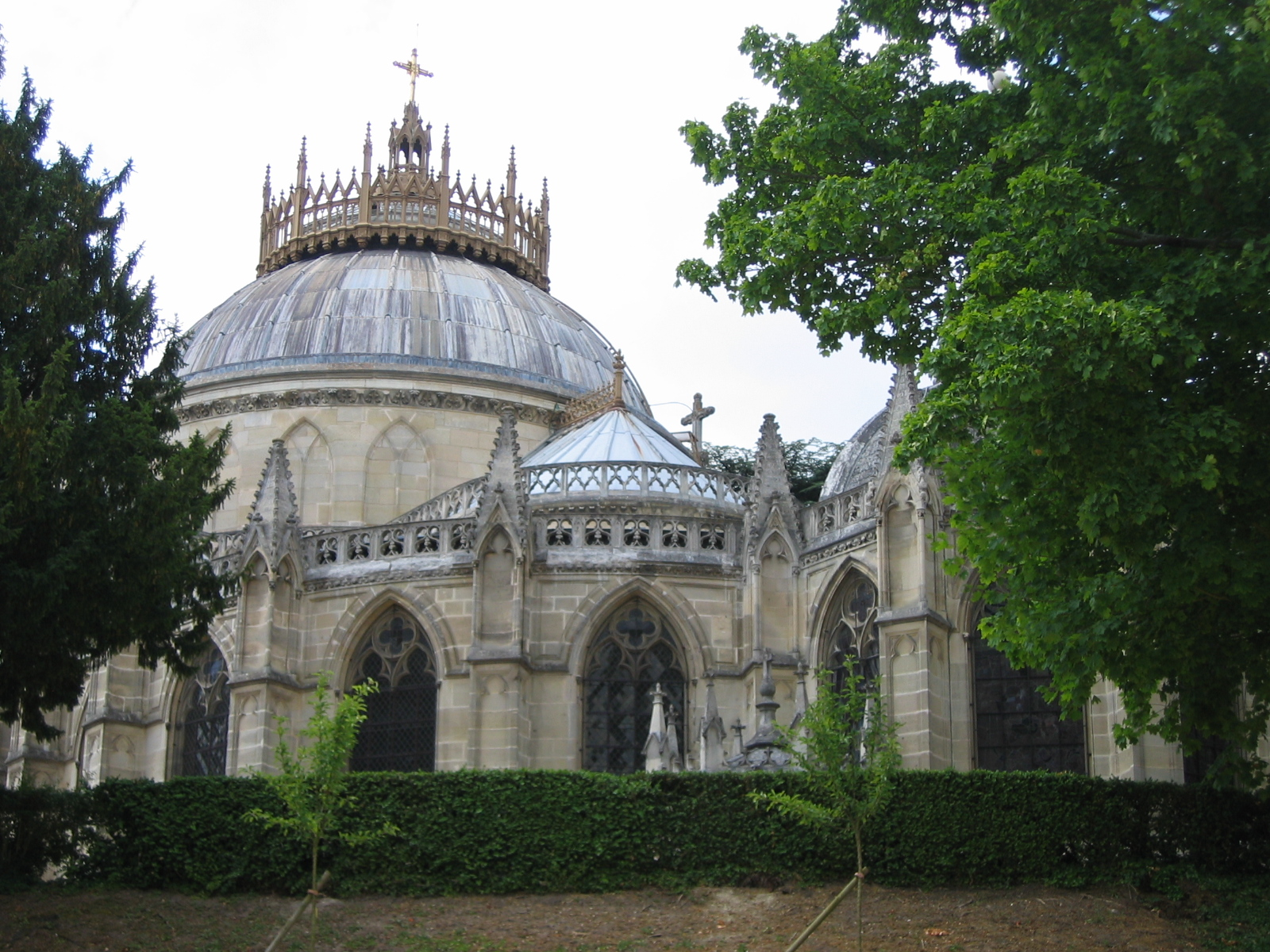 chapelle royale Saint-Louis de Dreux, Eure-et-Loir, France.